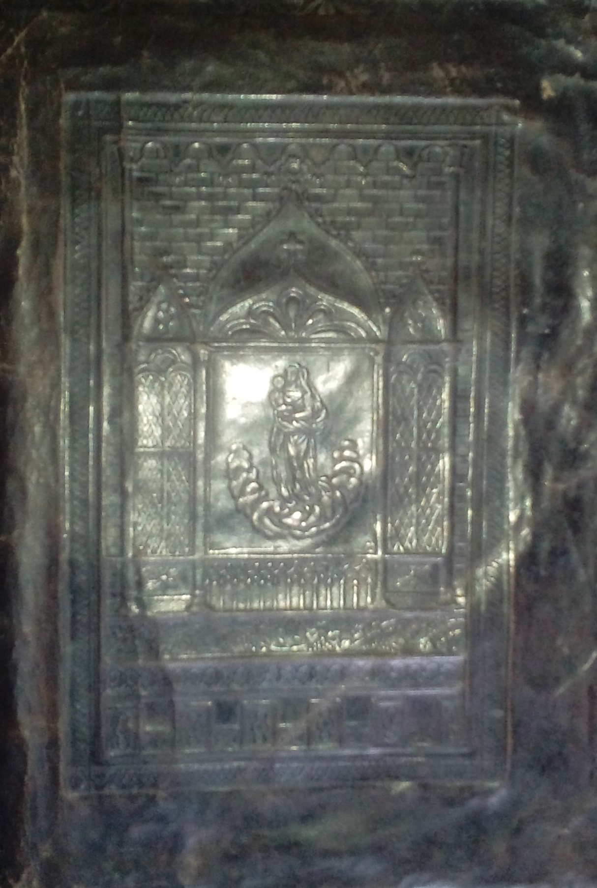 Illyés András "Szentek életének" 1813-as kiadása. (Külső borító.)